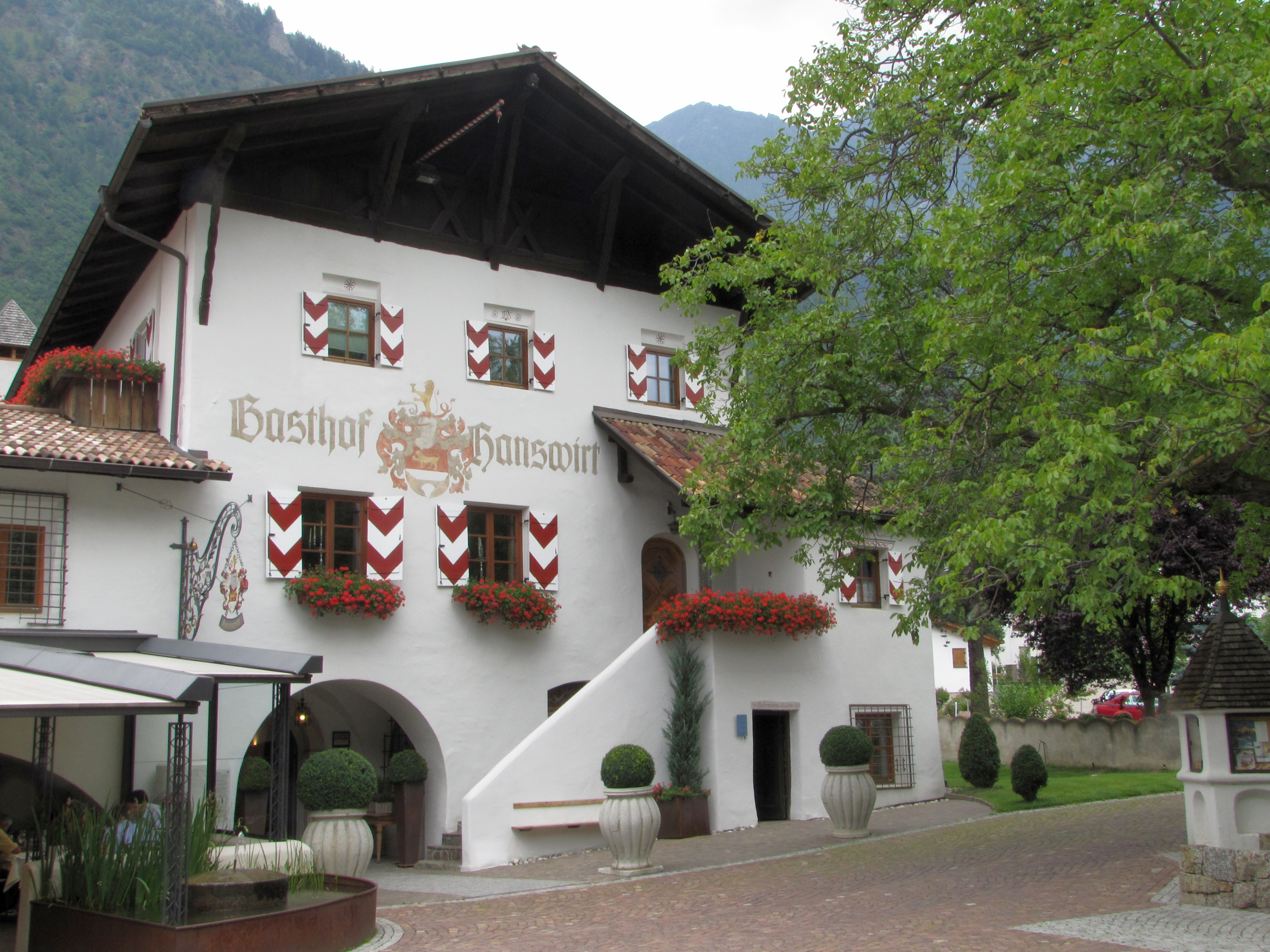 Hanswirt in Rabland